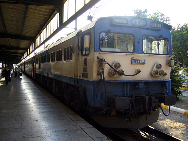 Ankara Express, Turkey - アンカラエキスプレス（トルコ） Electric locomotive E43 019